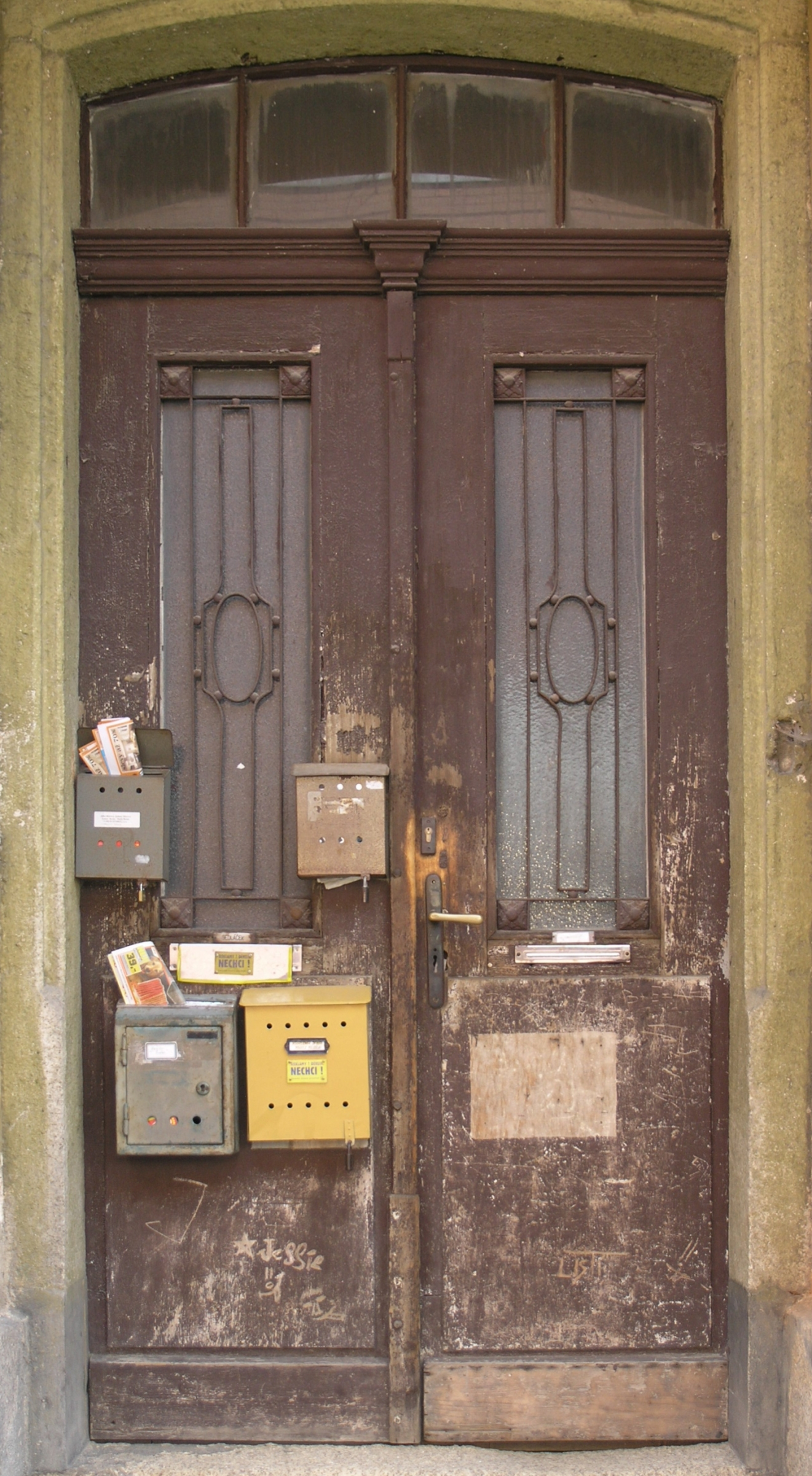 Česká republika, Jablonec nad Nisou - vchodové dveře domu v Jiráskově ulici